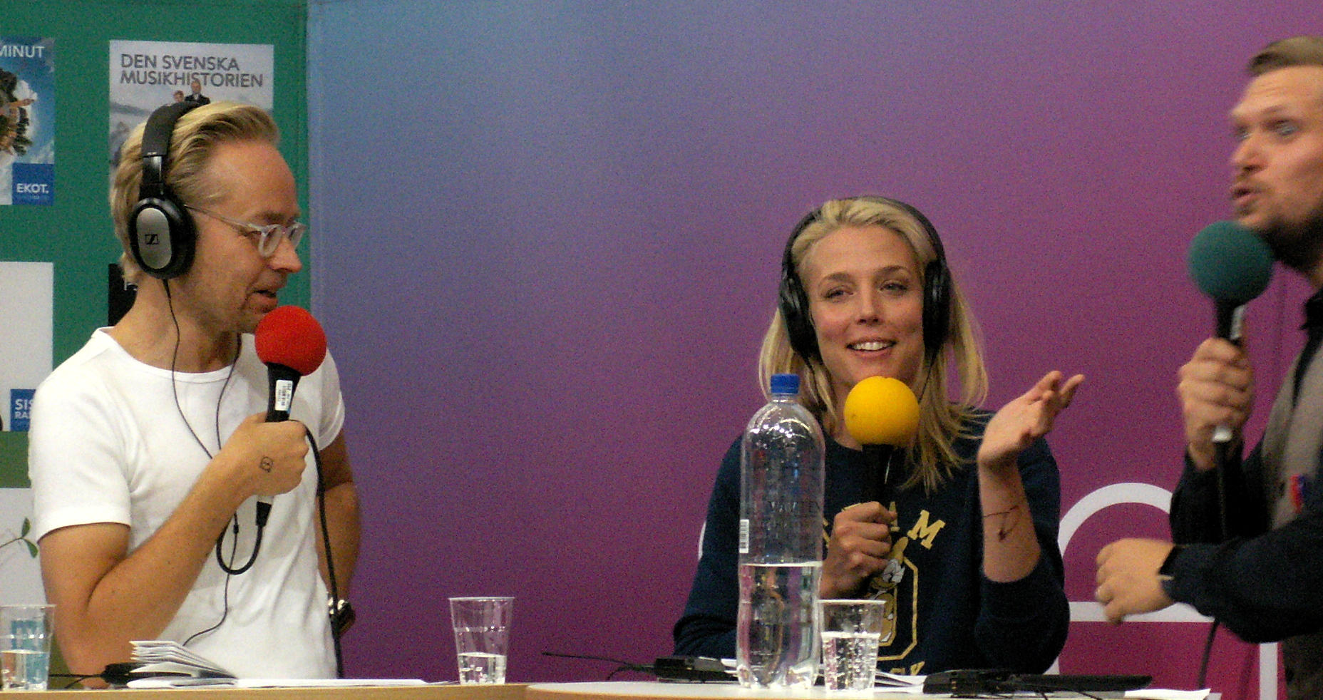 Fredrik Furtenbach, Annie Reuterskiöld och Henrik Torehammar under inspelning av podden Det politiska spelet.